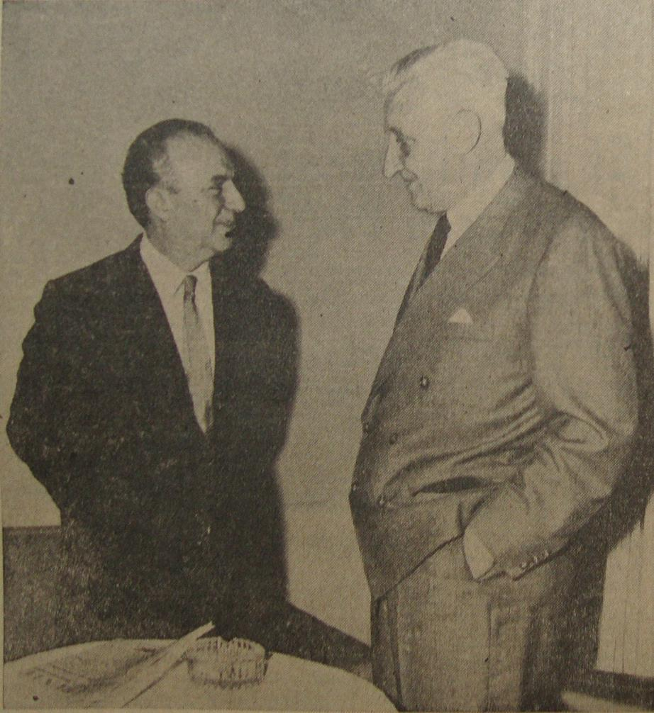 El Presidente electo Arturo Illia, reunido con su Vicepresidente Carlos Perette. En una entrevista realizada en el Hotel Savoy de Buenos Aires, definiendo su futuro gabinete de ministros.